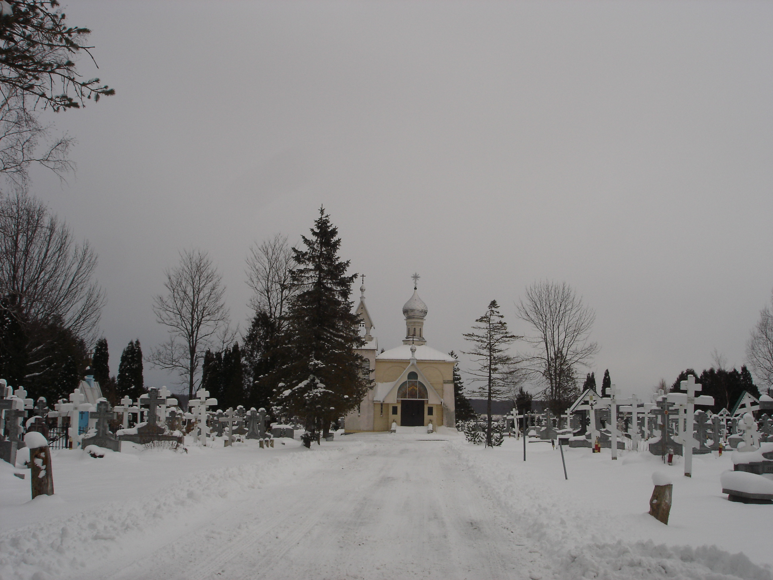 2010-12-11 Jordanville 028